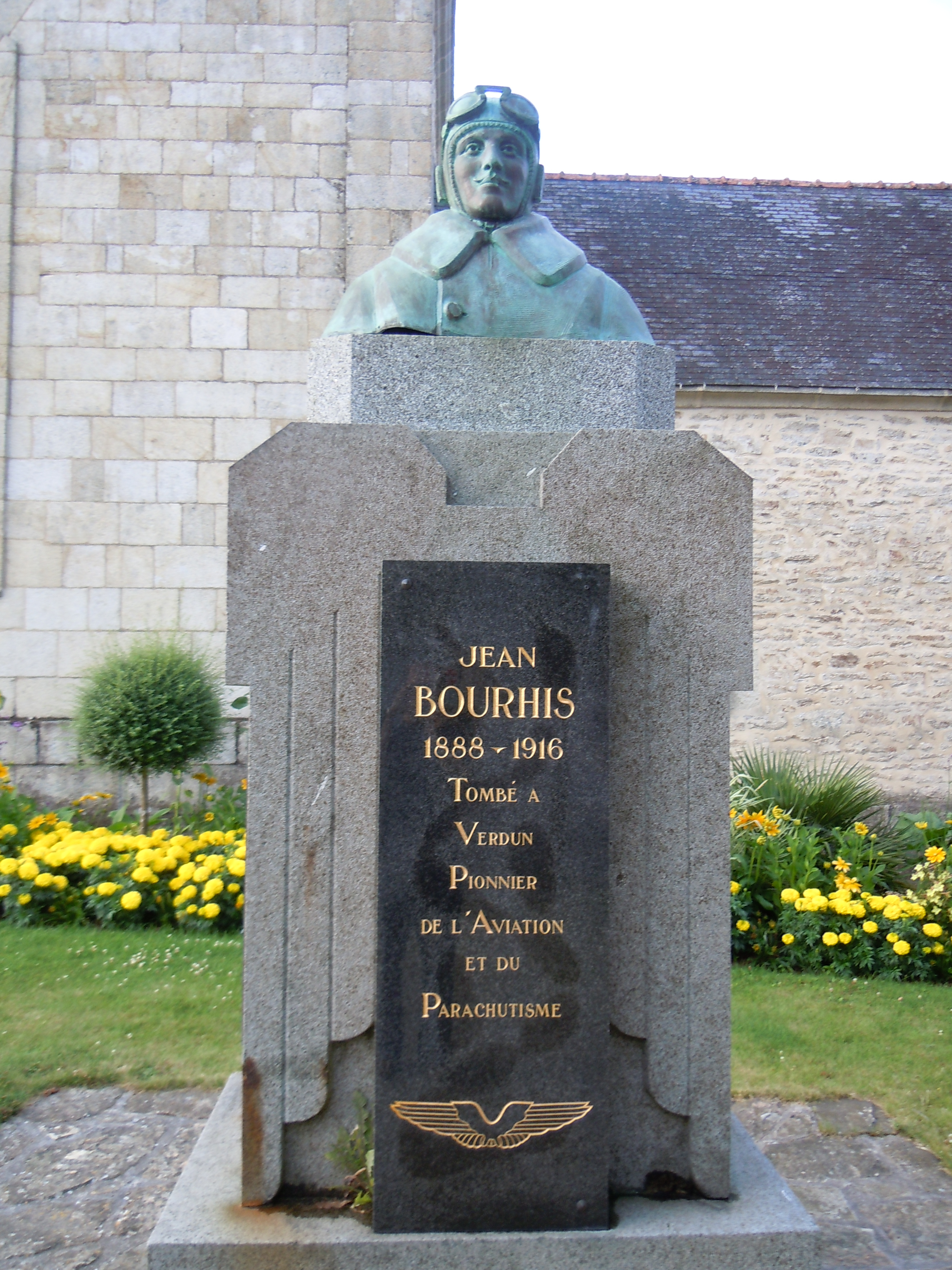 buste de l'aviateur et parachutiste Jean Bourhis, situé sur la place de l'église au bourg de Bannalec, Finistère, France